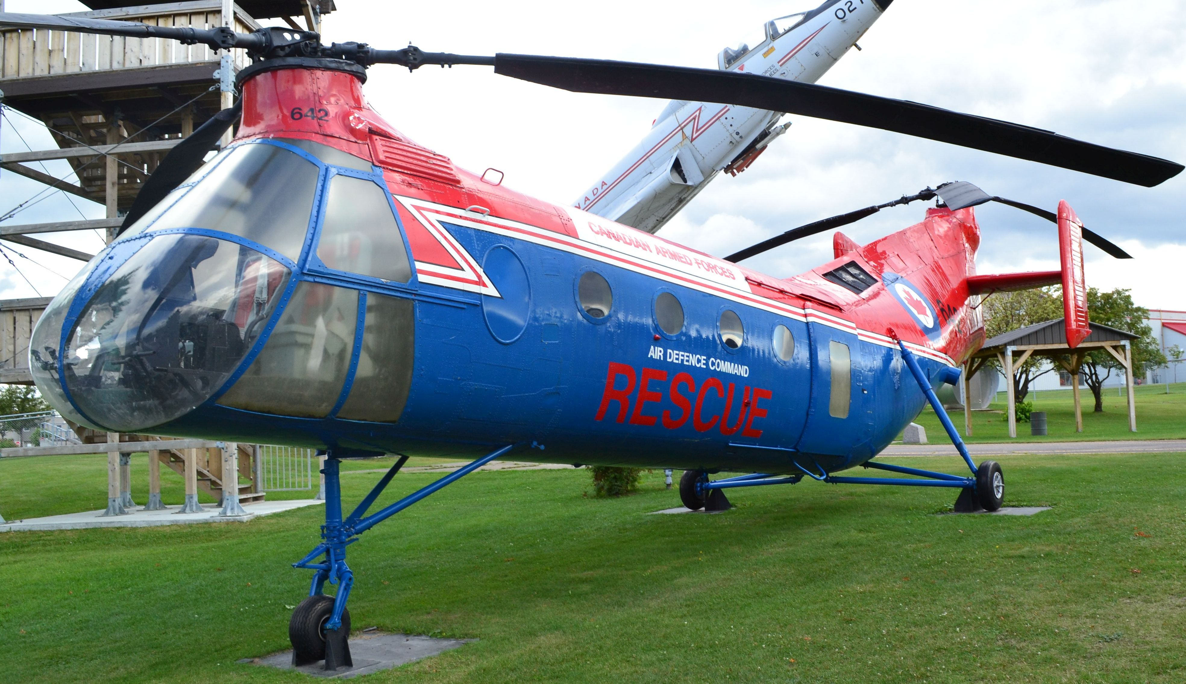 Hélicoptère Vertol H-21B au musée de la Défense aérienne. Muni de moteurs d'avion, il a été en service au Canada de 1954 à 1971. Nombre maximal de passagers : 20. Vitesse maximale : 211 km/h Masse à vide : 3 630 kg Moteur à pistons Wright R-1820-103 Cyclone 1 425 CH Fabricant : Vertol Aircraft (États-Unis)